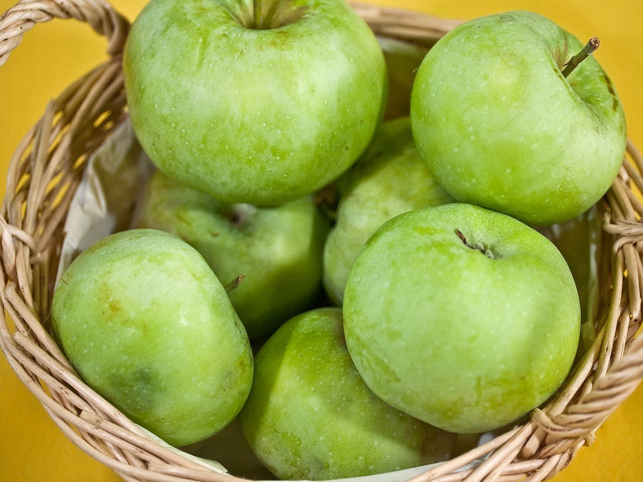 Der Ontario ist eine Apfelsorte